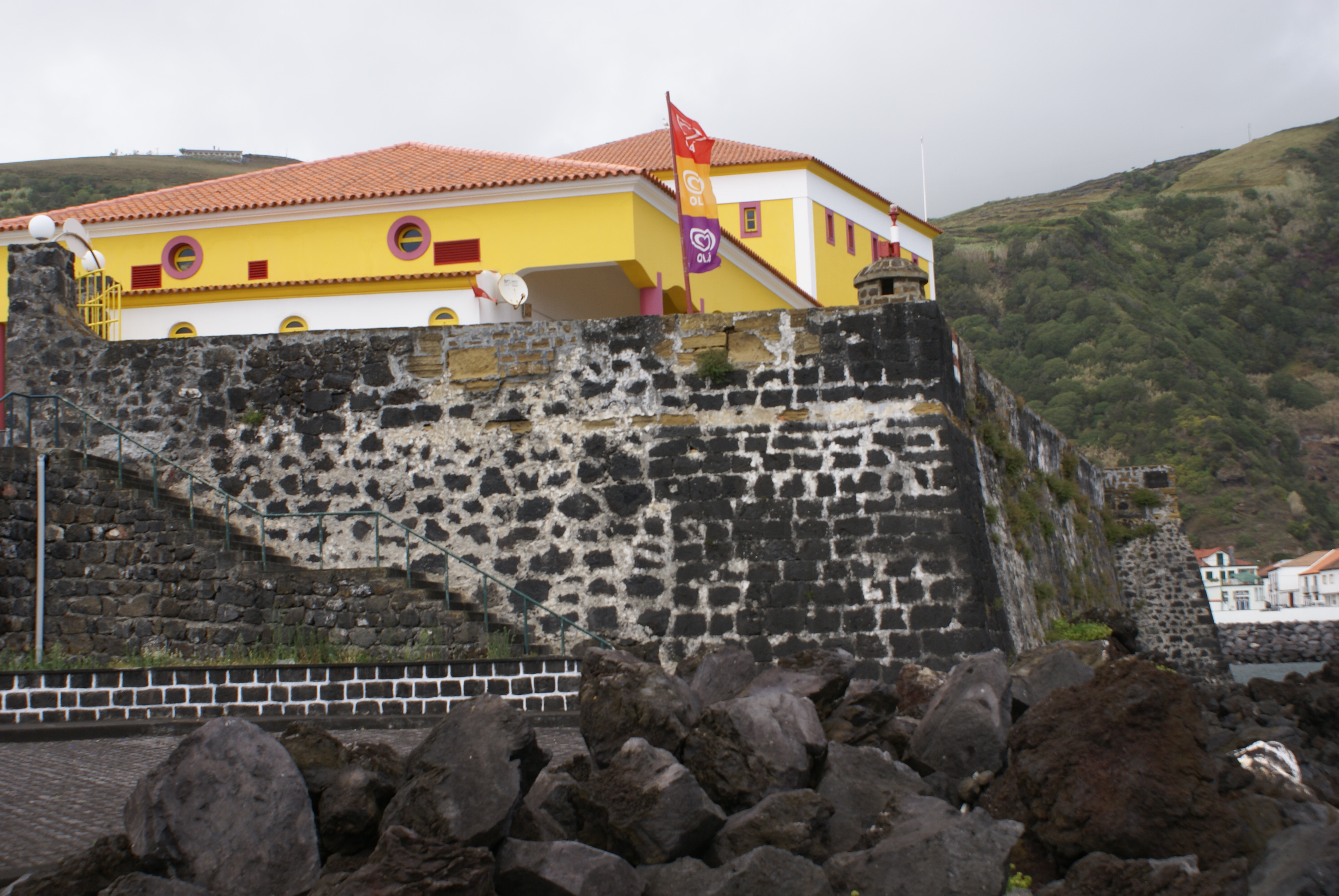 Muralhas do Forte de Nossa Senhora da Conceição, Velas, ilha de São Jorge, Açores